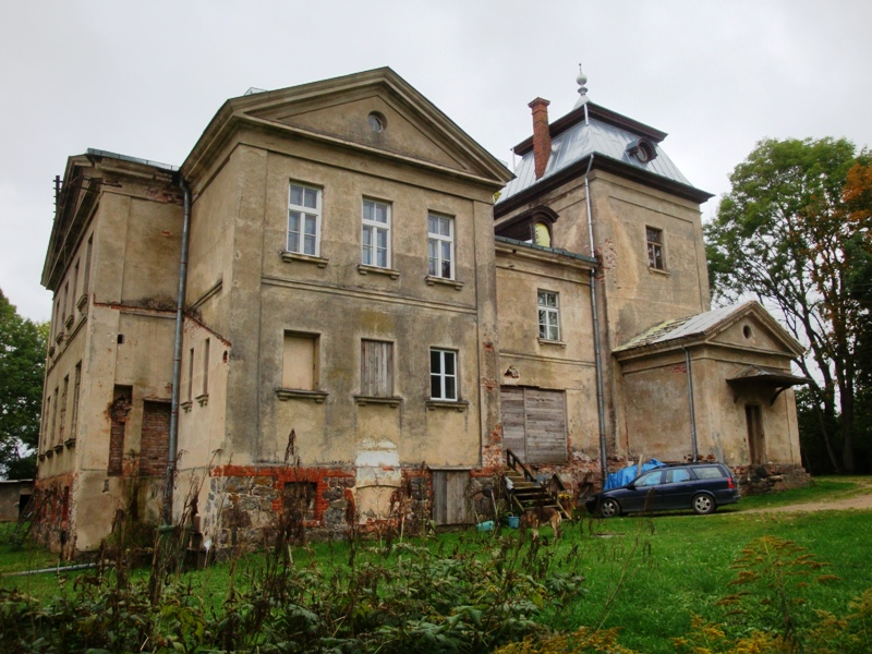 Veismani manor near Priekuli